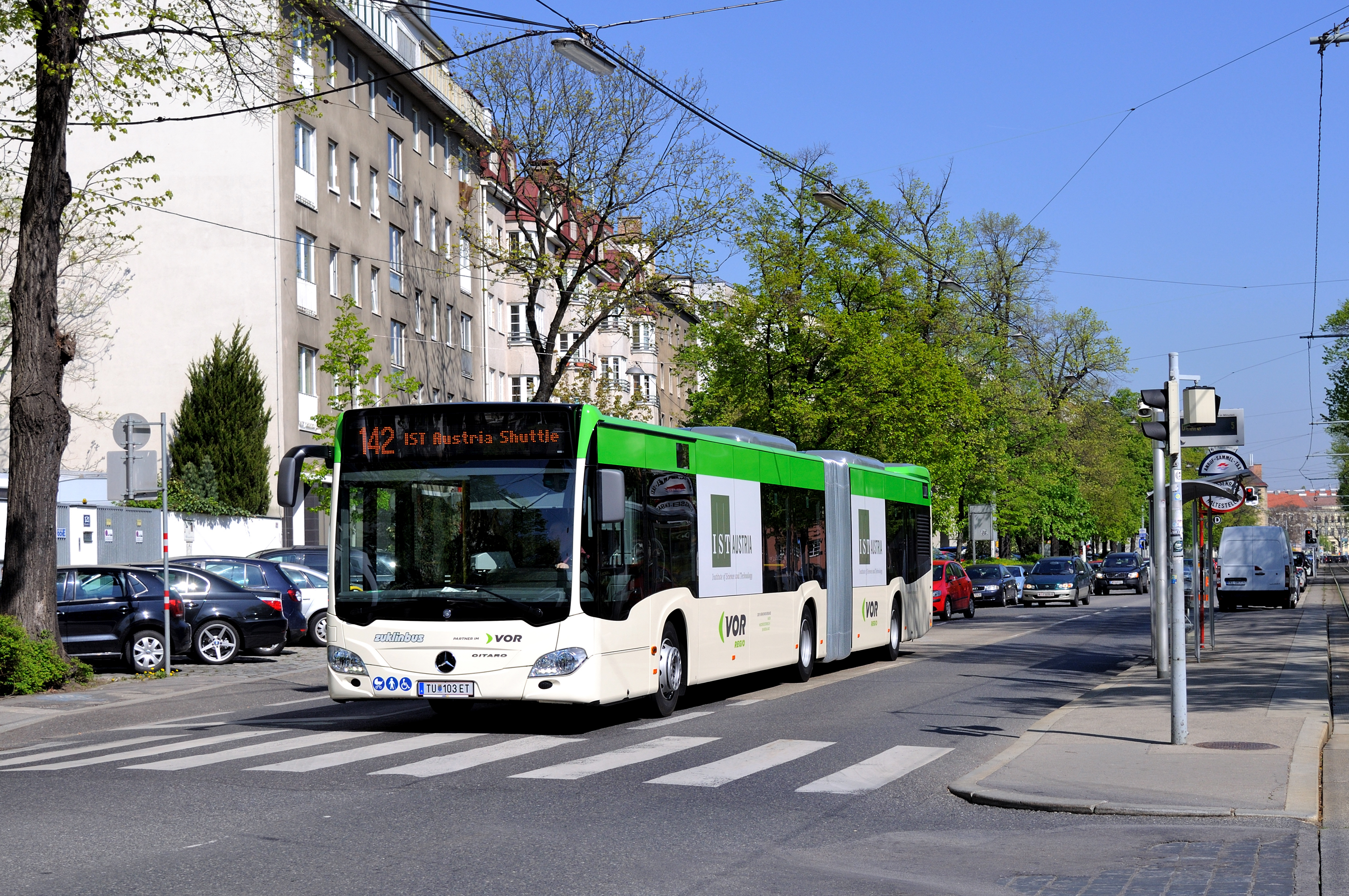 Ein Mercedes-Benz Citaro von Zuklinbus als Linie 142 "I.S.T. Austria Shuttlebus" in Heiligenstadt.